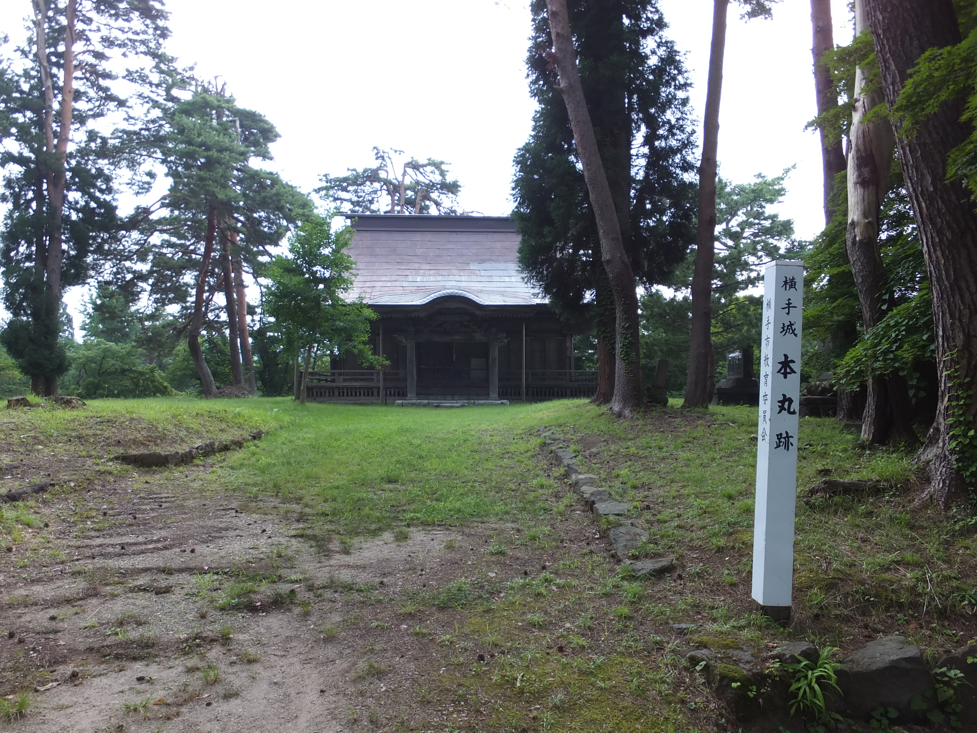 横手城本丸内、秋田神社